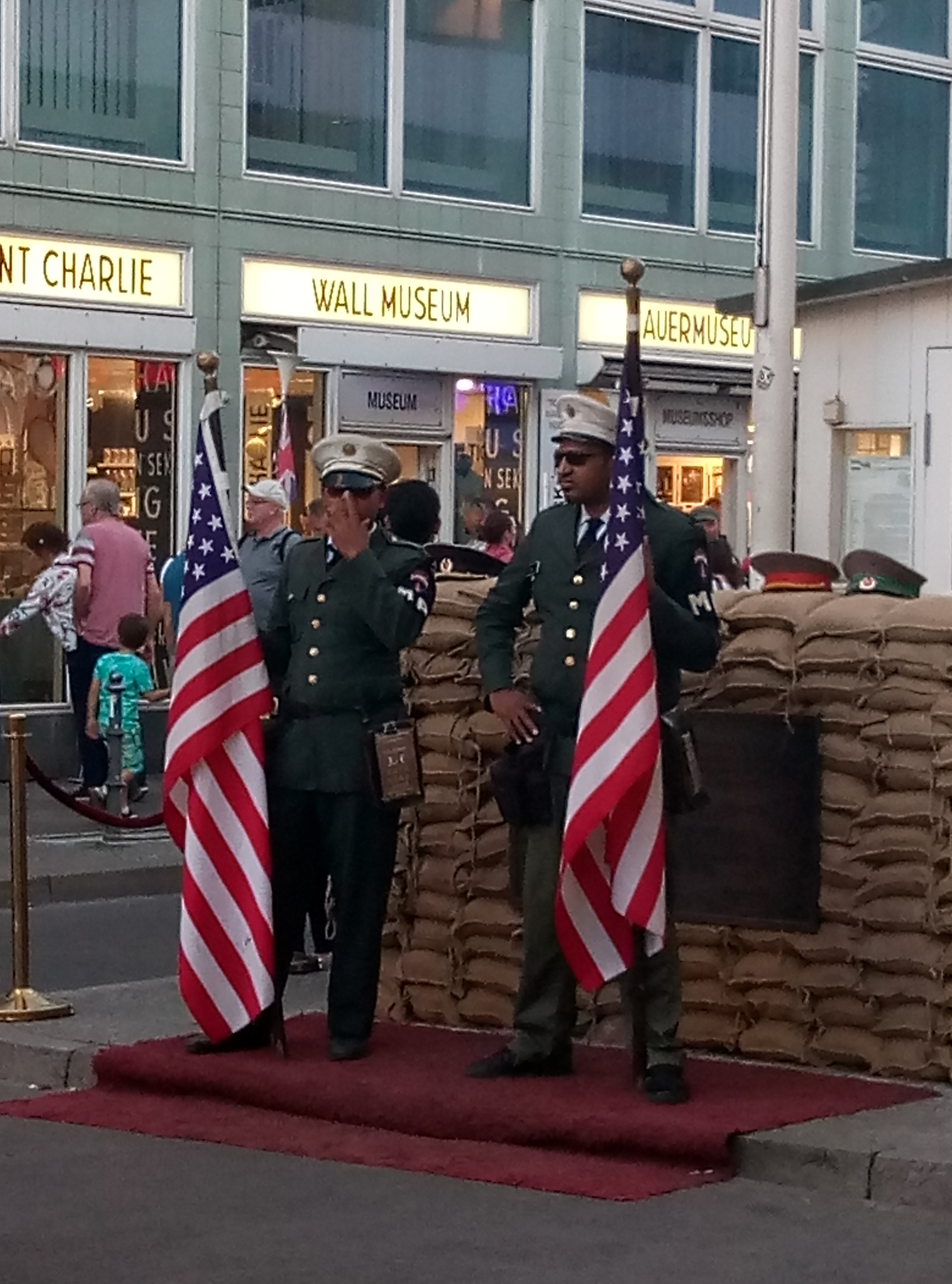 Берлін. КПП «Чекпойнт Чарлі». 2018 рік.